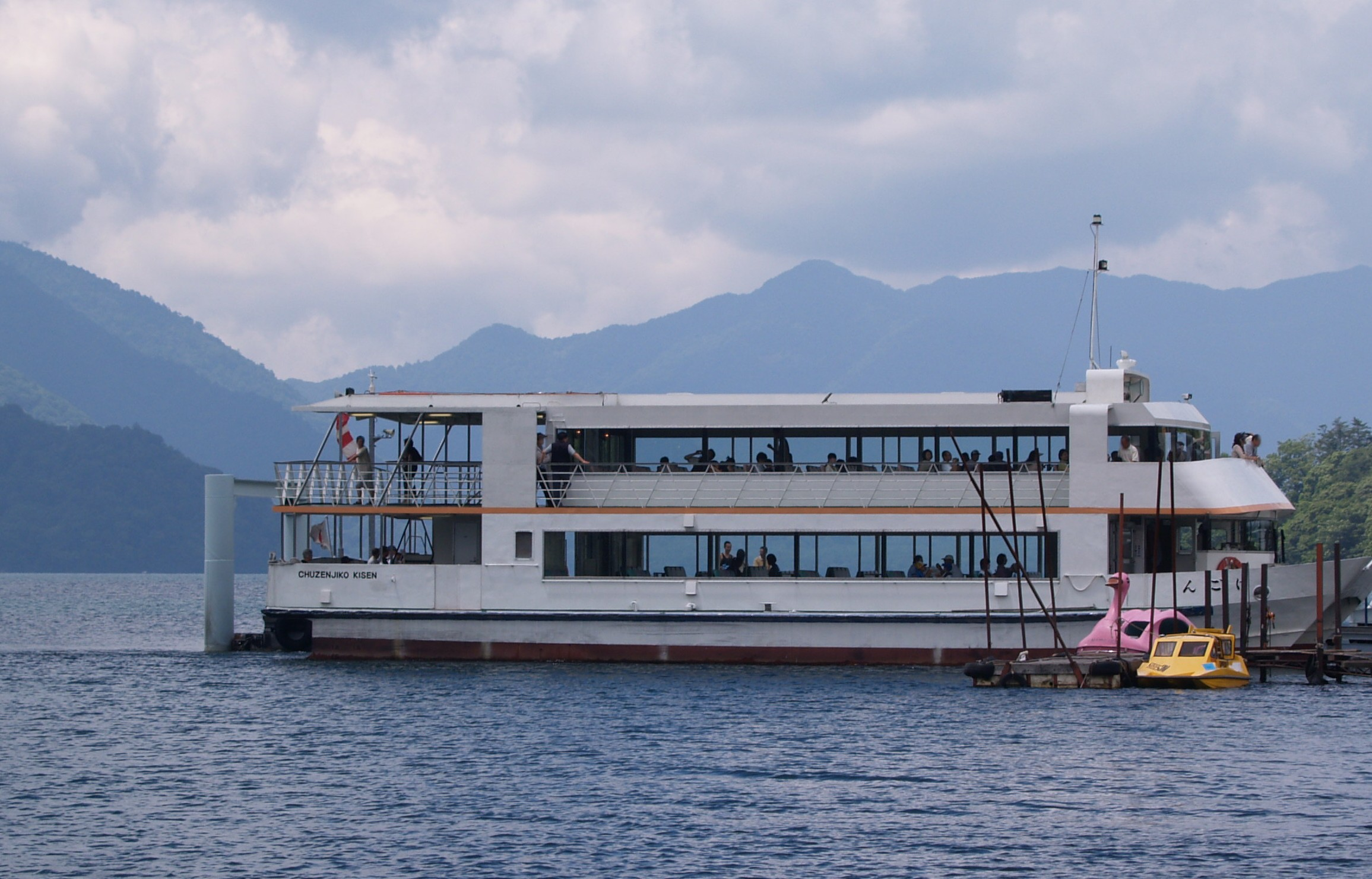 東武興業が中禅寺湖で運航する遊覧船「けごん」